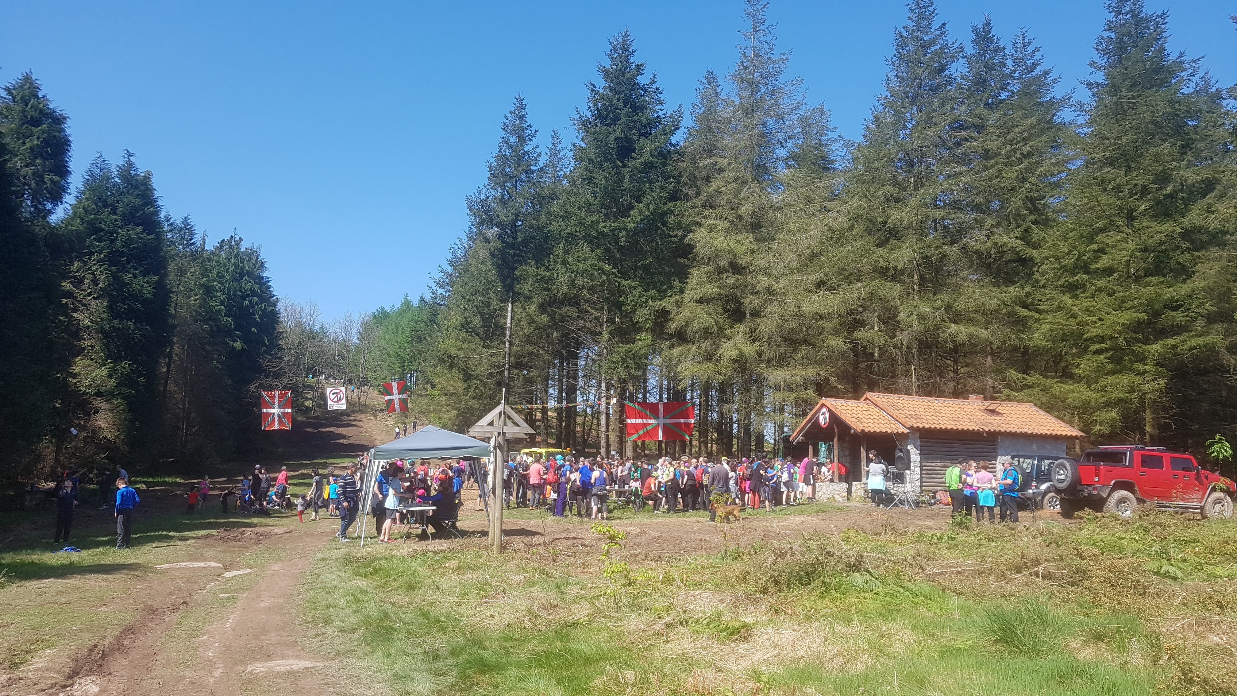 2018ko maiatzaren 6an ospatutako Andatza egunean jendetza aterpearen inguruan.